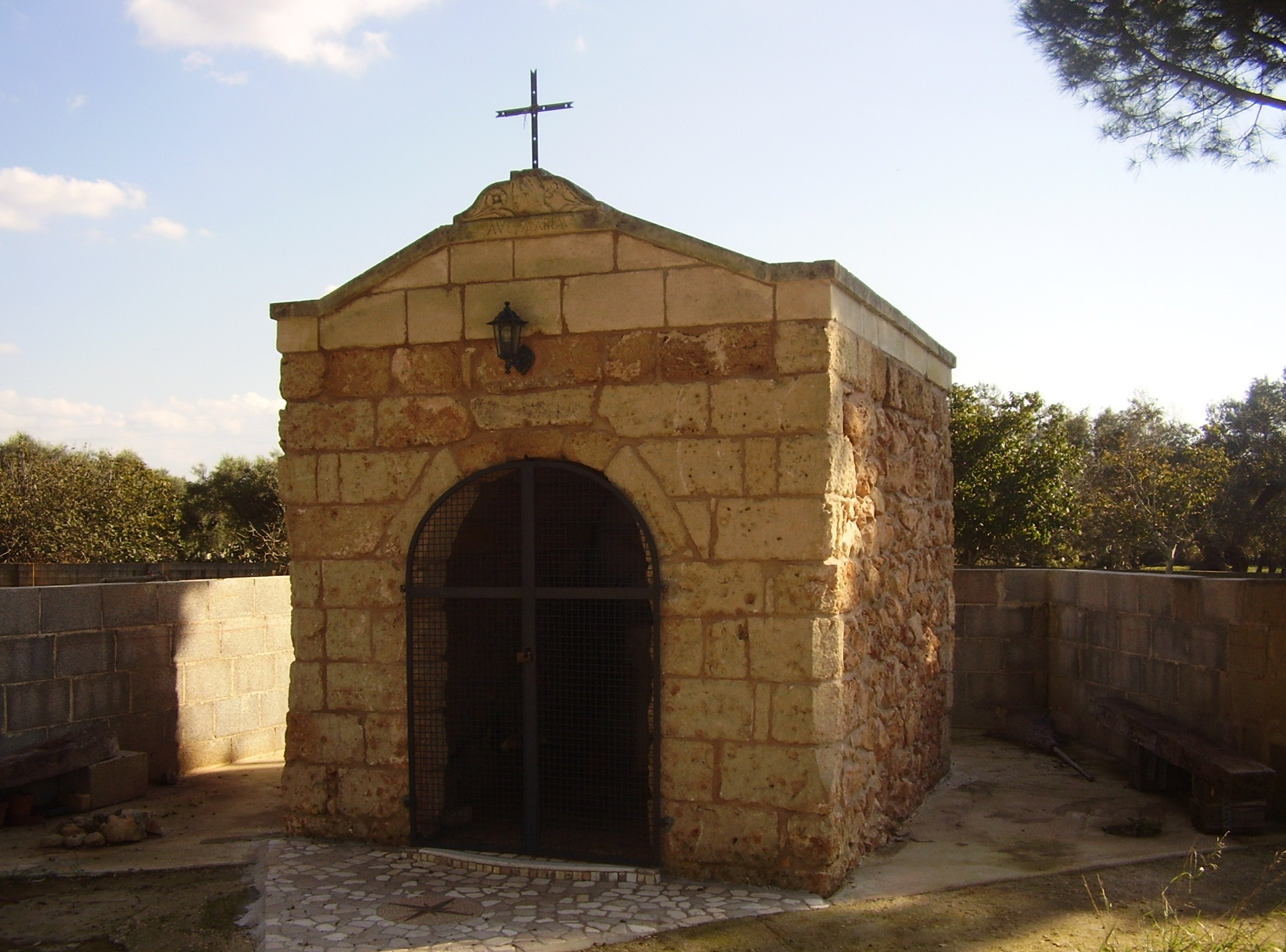 Cappella dell'Immacolata San Pietro in Lama, Lecce